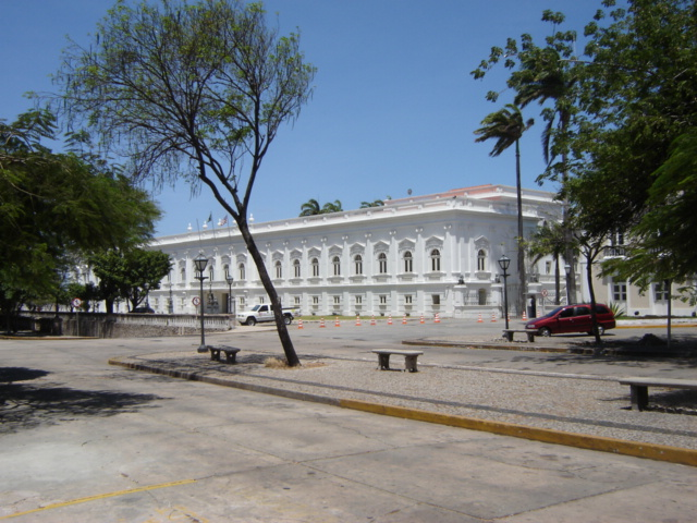 Palácio dos Leões, sede do governo do estado do Maranhão.